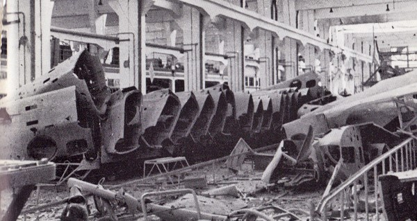 A Dunai Repülőgépgyár (DRGY) törzsszereldéje 1944-ben. Ismeretlen fényképész felvétele. 1941. július 1-én a Weiss Manfréd Konszern és a Magyar Állam megalapította a Dunai Repülőgépgyár (DR) Rt.-t. Tökölön 228 katasztrális holdon repülőteret is létesítettek. A Repülőgépgyárat Sailer István építész tervei alapján kivitelezték. Az építési munkák 1942. januárjában fejeződtek be. A gyárban az augsburgi Messerschmitt gyár Me210 és Me109 típusú repülőgépek C-1-es sárkányait szerelték össze és a stuttgarti Daimler Benz gyár 605A és 605B motorjait gyártották licenc alapján. Az amerikai bombázás miatt a gyárat a kőbányai pincerendszerbe költöztették át. 1944. október 16-ig 272 darab Me210 Ca-1-es szárnyat és a csepeli Weiss Manfréd Repülőgép- és Motorgyár Rt.-vel közösen 1208 darab DB 605A, B és D motort gyártottak le.